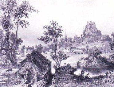 La Roche-Maurice : lithographie (non datée, mais ayant plusieurs siècles, anonyme)